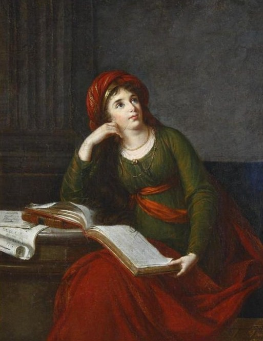 Княгини Е. Ф. Долгорукова в образе Сивиллы